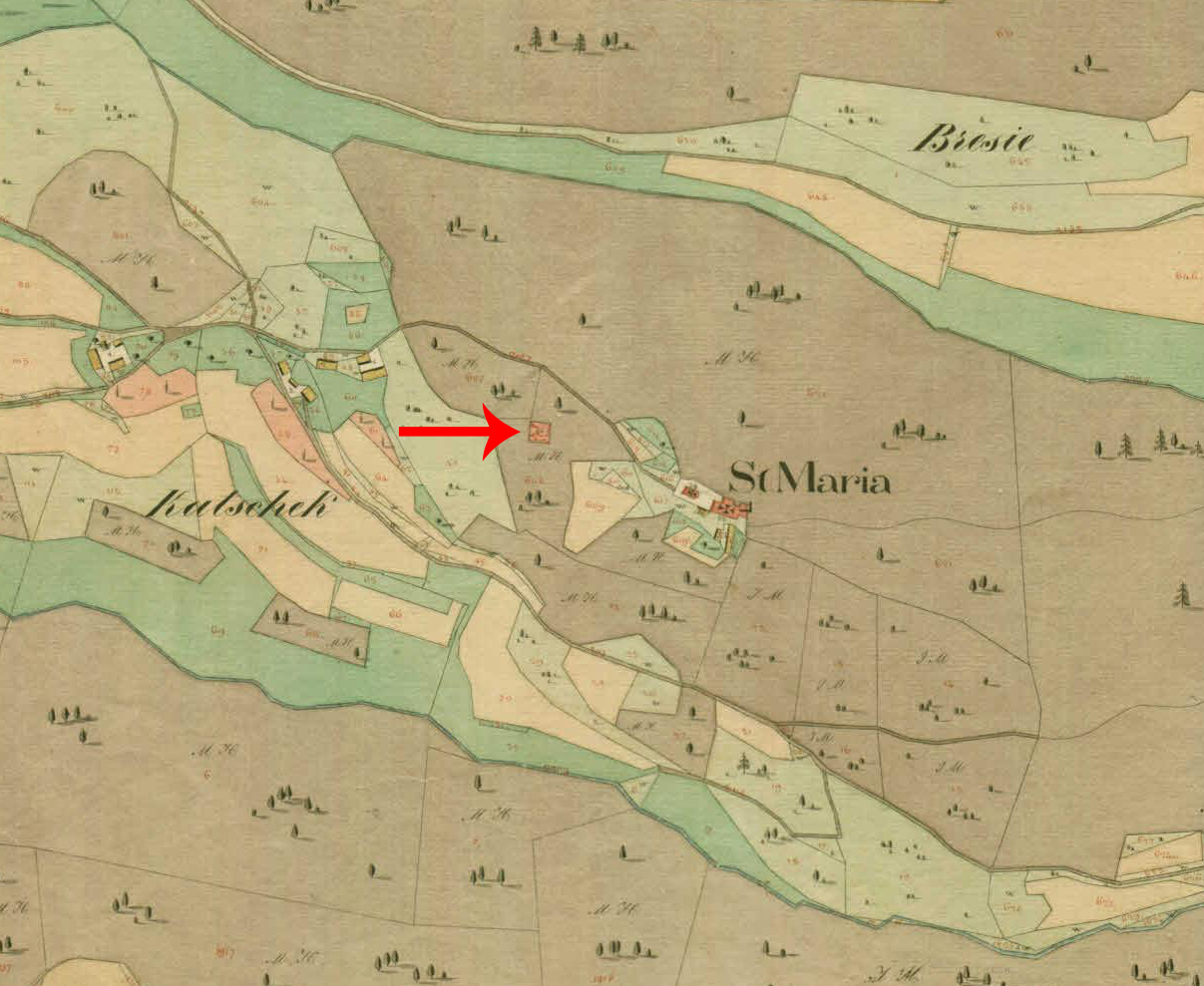 Franciscejski kataster za Kranjsko, 1823-1869